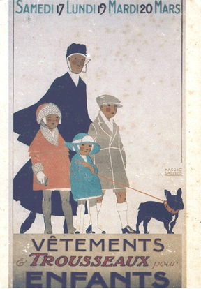 Affiche de mode enfantine pour les Grands Magasins du Louvre. Paris